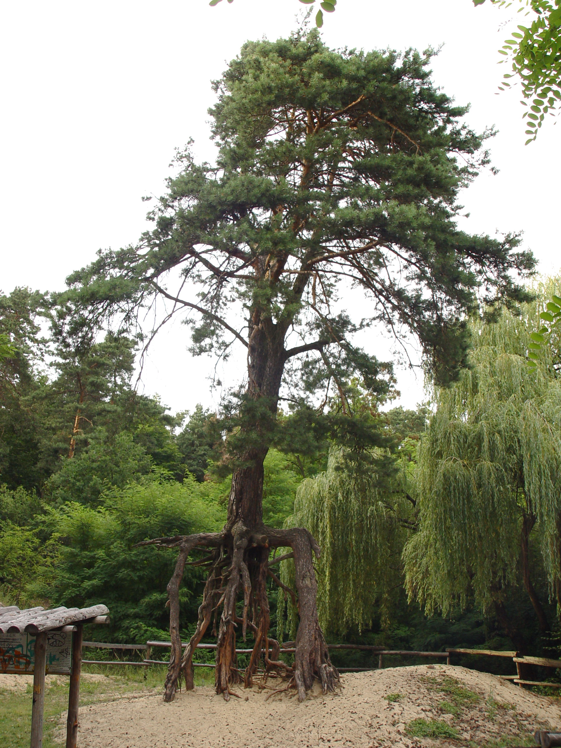 Wełecz, Sosna zwyczajna Pinus sylvestris, pomnik przyrody